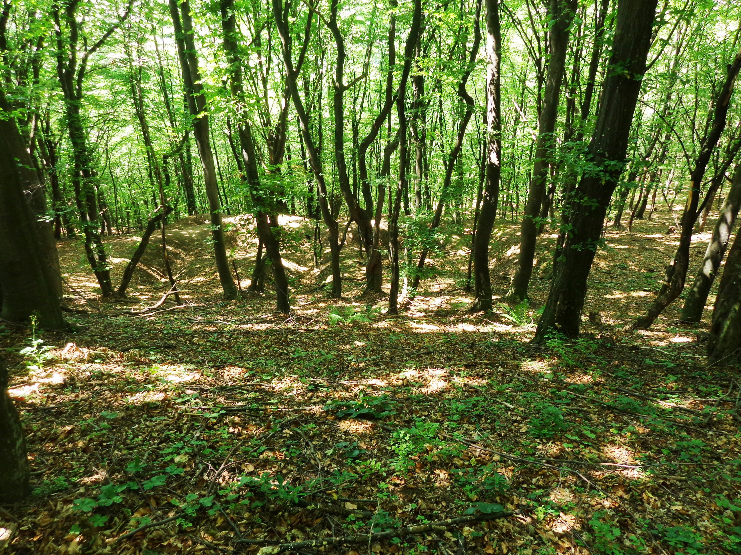 Cetatea dacică de la Tilişca. Urme construcţii Versant nordic. 02